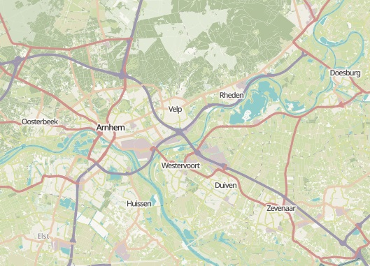 Arnhem speelt als centrumgemeente een centrale rol in de regio. Dit afbeelding geeft aan welke gemeenten tot de stadsregio-subregio Arnhem behoren.